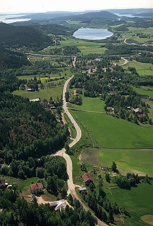 Arnäsdalen Motiv: Arnäs Nyckelord: Flygbilder, Riksintressen Kategori: Miljöer, Odlingslandskap Arnäsdalen.